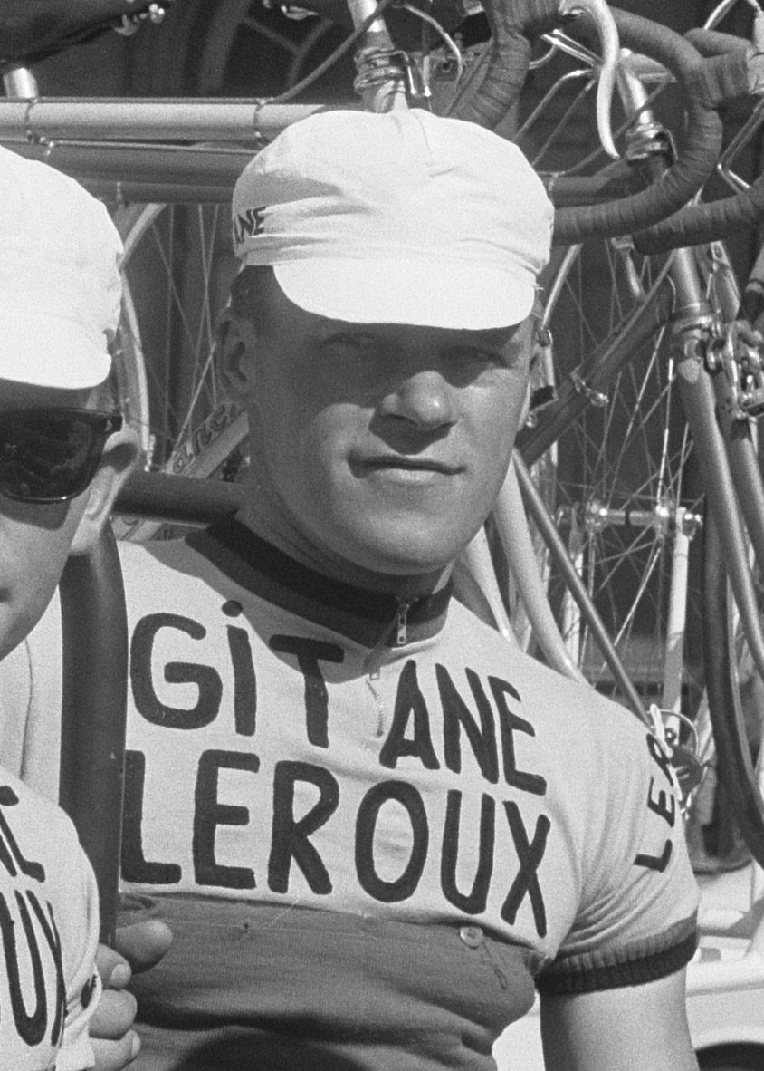 Tour de France 1962 , Ploeg Gitane Leroux.